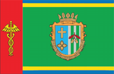 Прапор Глибоцького району